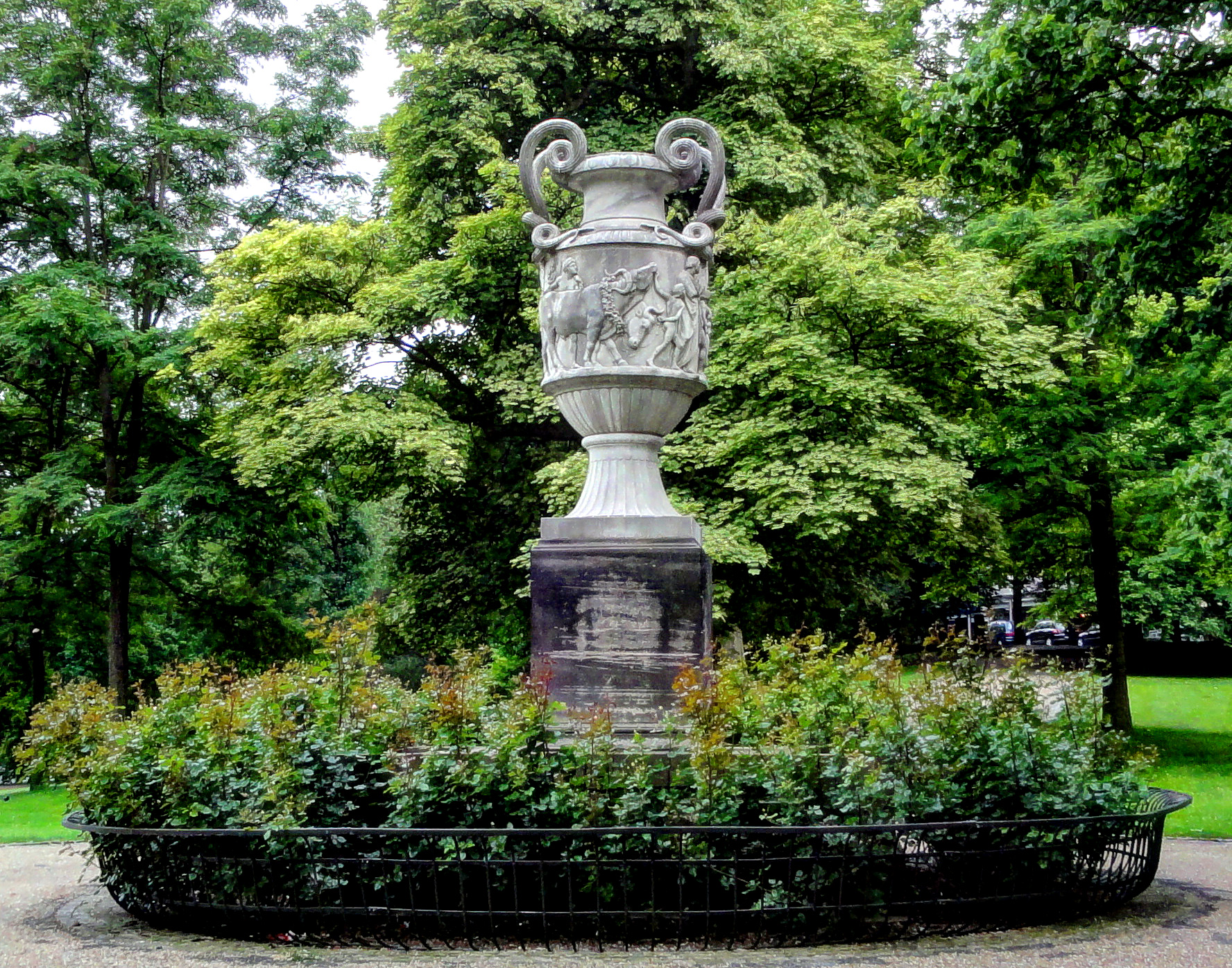 Vase (Carl Steinhäuser) in Bremen, WallanlagenDas abgebildete Objekt ist ein geschütztes Kulturdenkmal in der Freien Hansestadt Bremen, mit der Nr. 1193,T003 beim Landesamt für Denkmalpflege registriert.